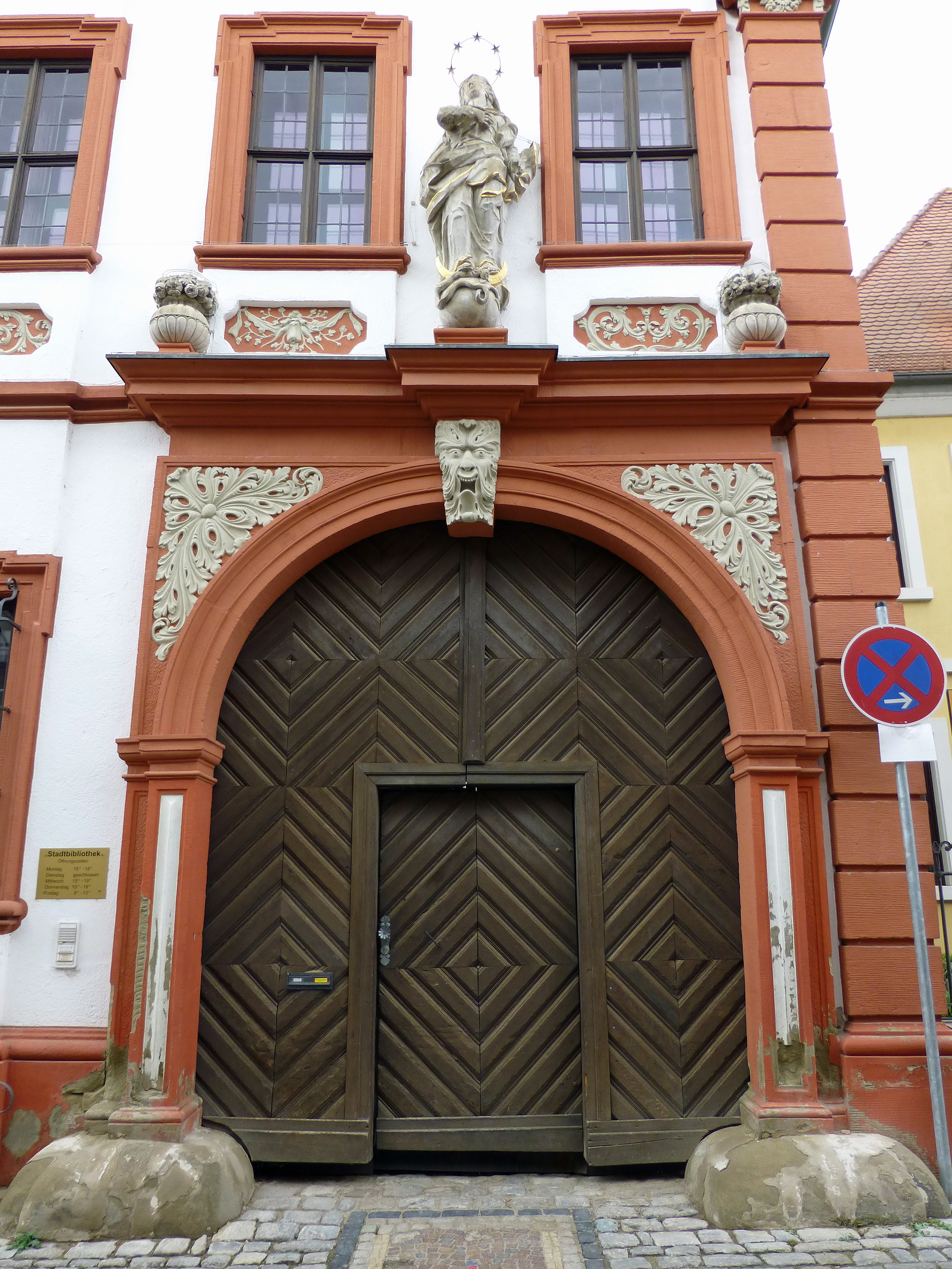 Volkach (Bavière) : Schelfenhaus (constr. 1719)